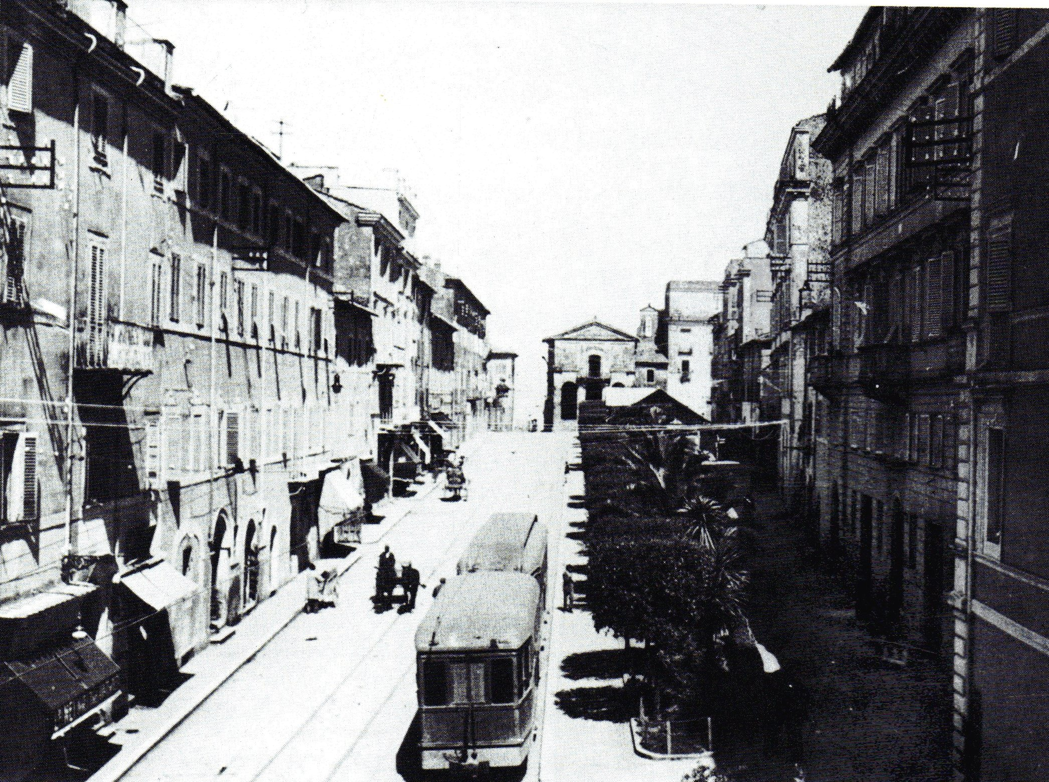 Corso di Albano Laziale (RM) negli anni dieci del Novecento